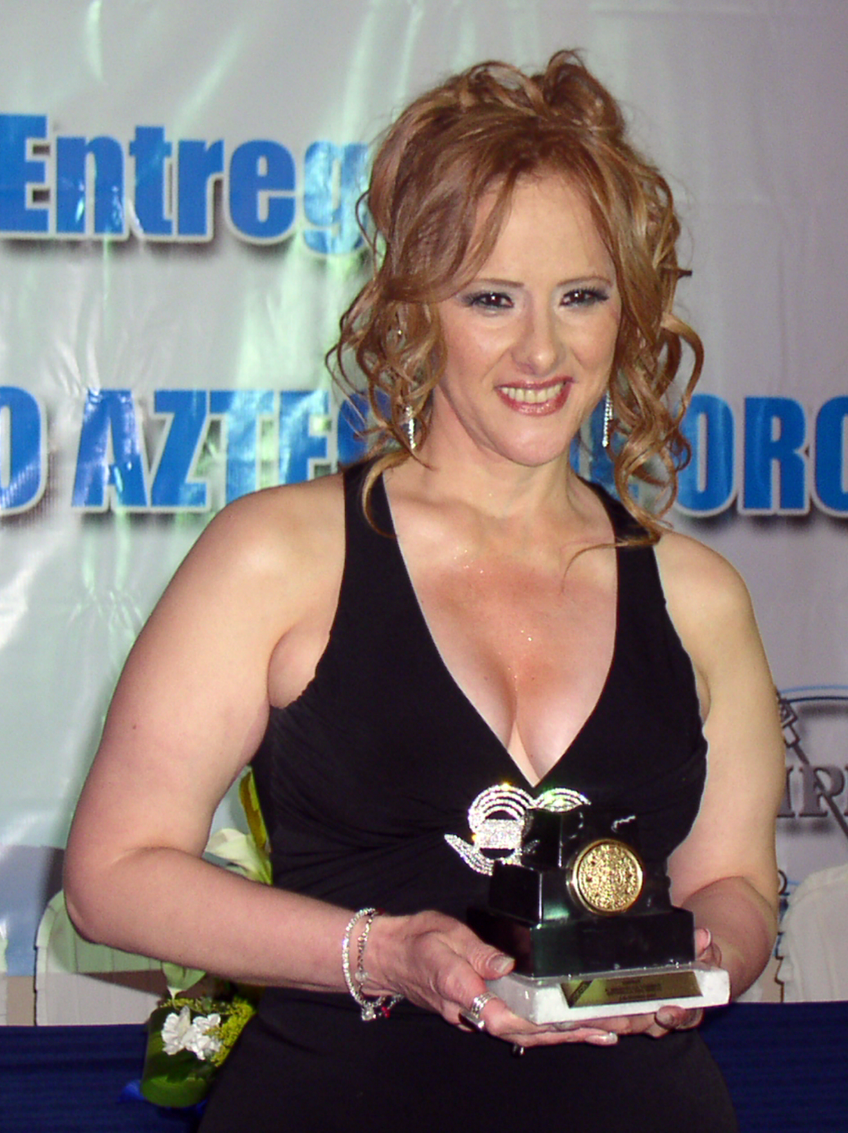 Manoella Torres siendo galardonada como "Estrella del siglo" con el "Calendario azteca de oro", presea instituida por la Asociación Mexicana de Periodistas de Radio y Televisión (AMPRyT)